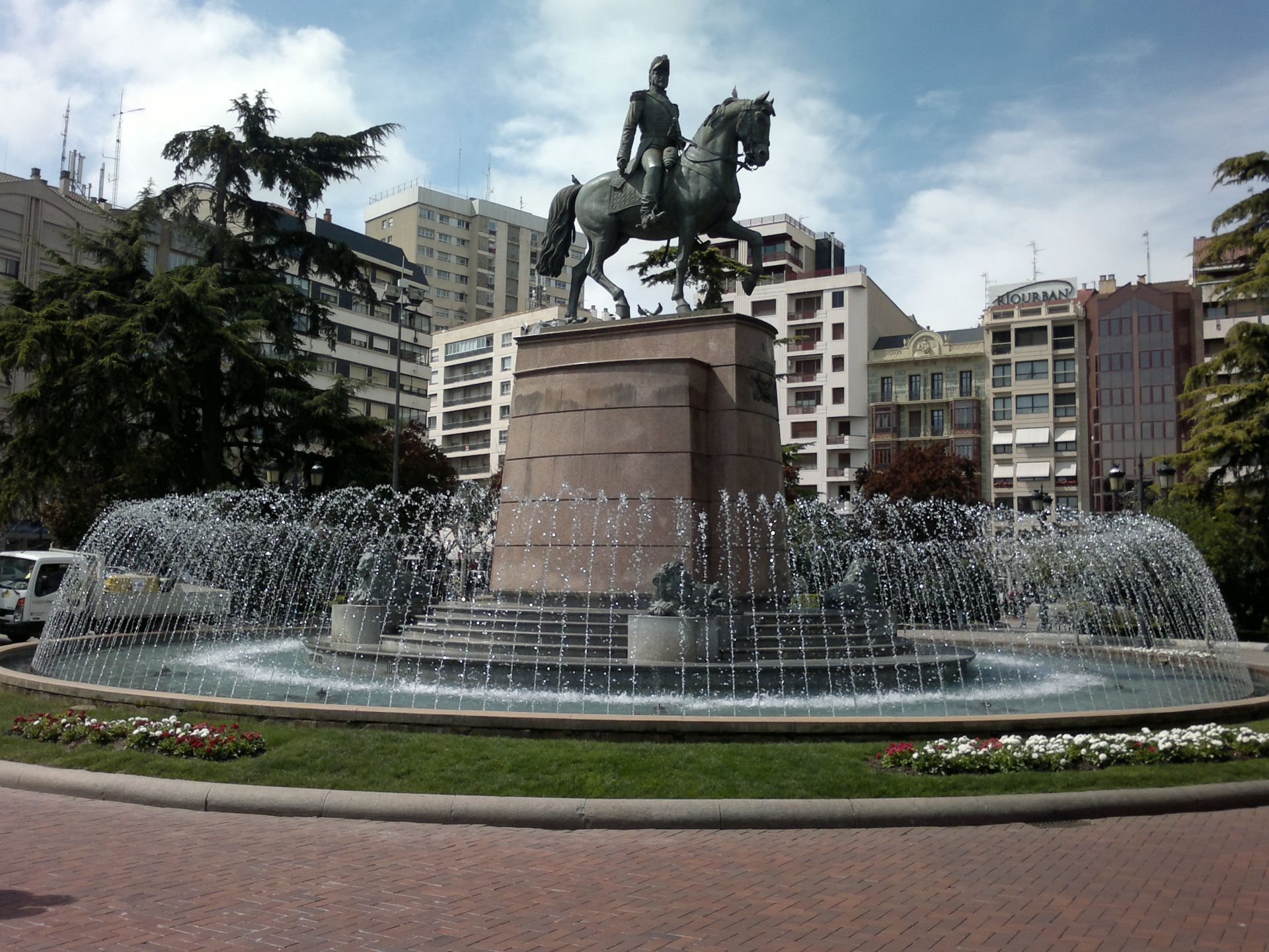 Foto del Paseo del Espolón